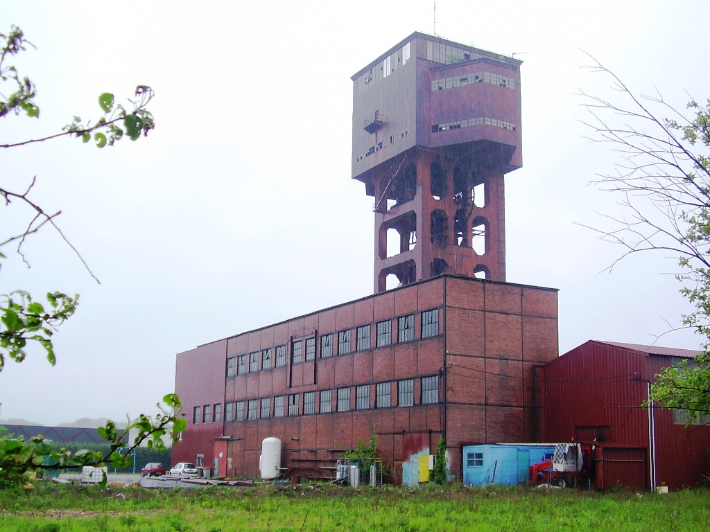 siege de Folschviller